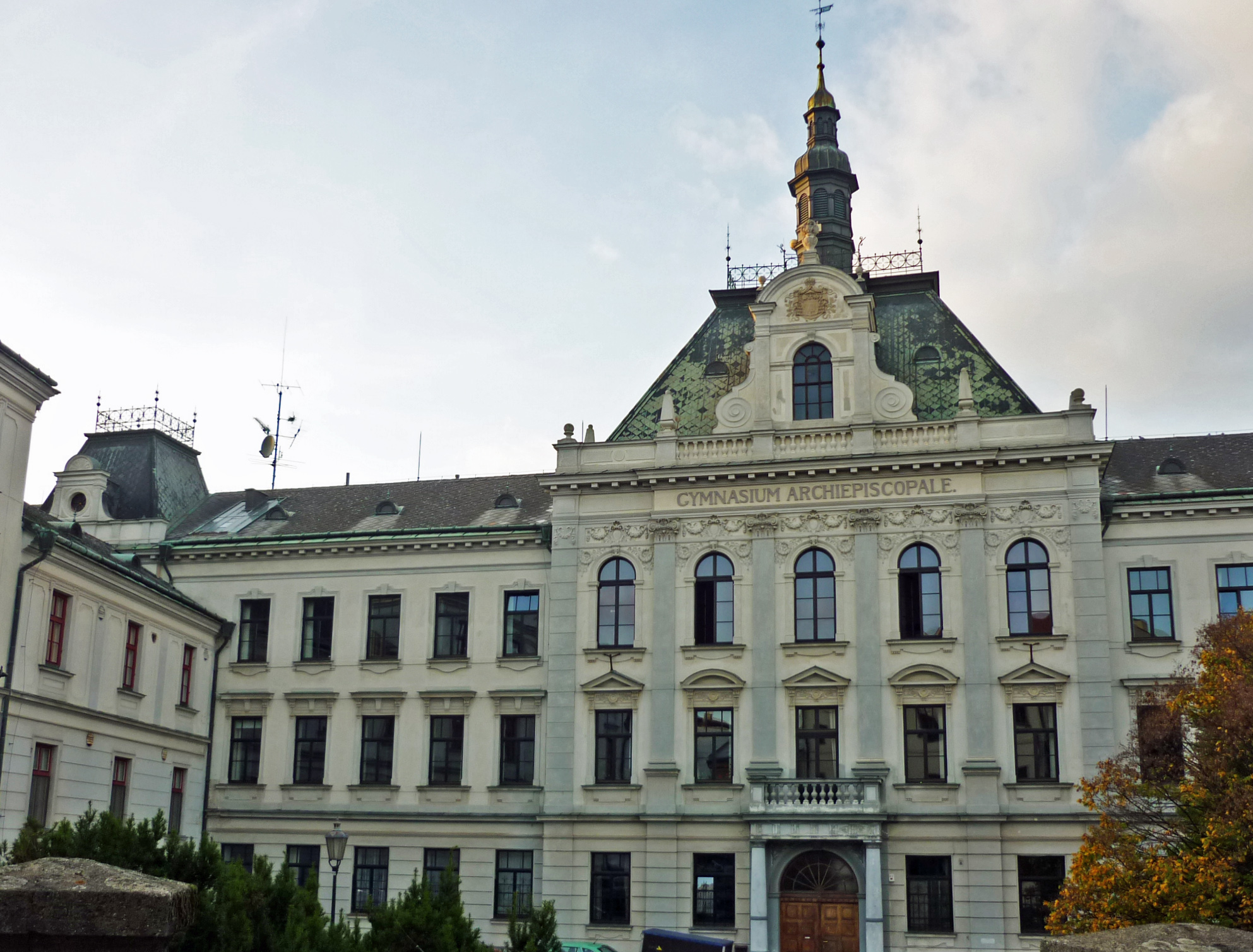 Erzbischöfliches Gymnasium in Kremsier (Kroměříž) in Mähren